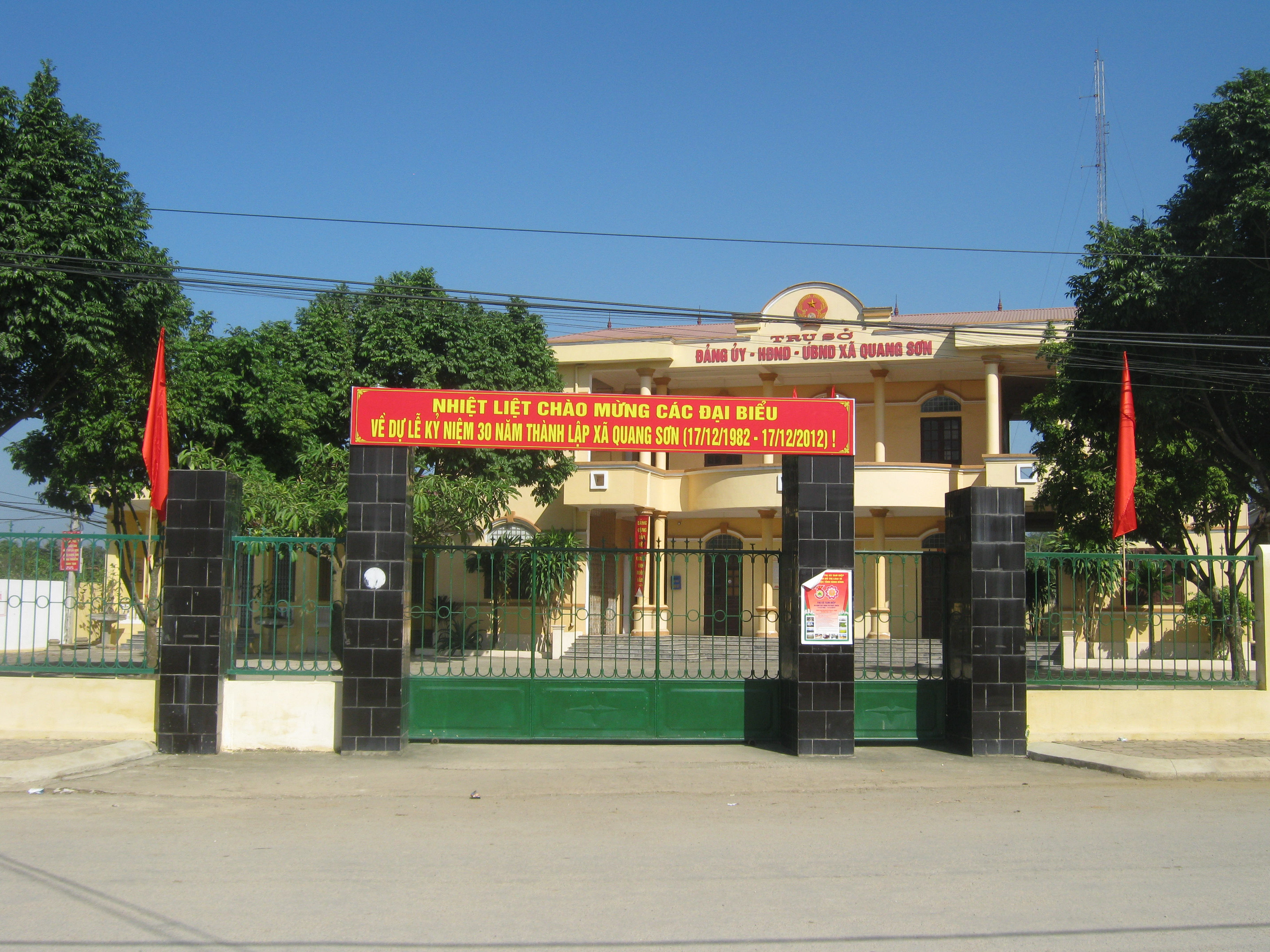 Trụ sở Quang Sơn, Tam Điệp, Ninh Bình